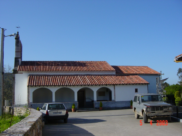 Iglesia de Santa María de Quinzanas.